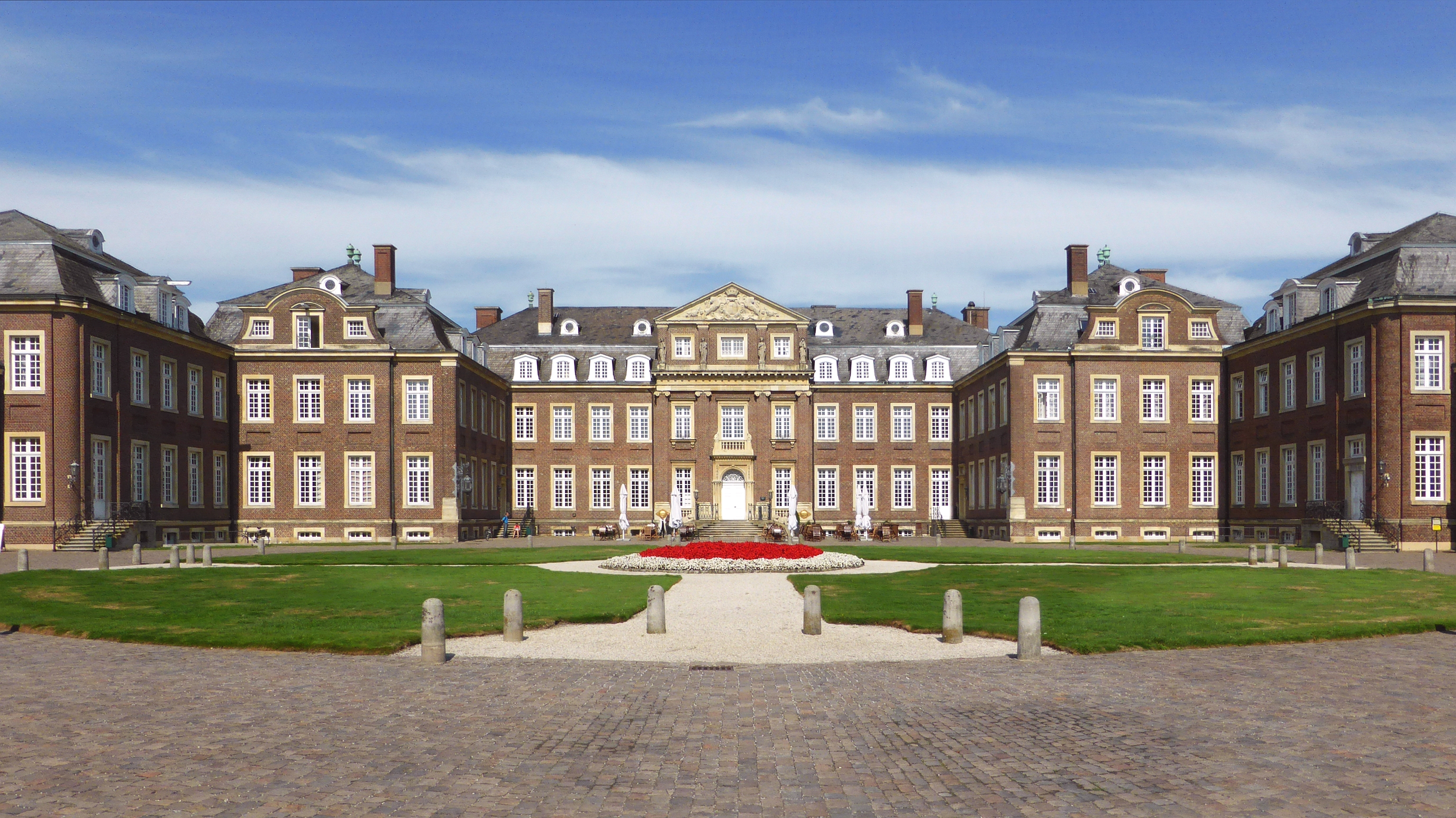 barockes Schloss Nordkirchen - Anlage als Wasserschloss - Hauptgebäude mit Eckpavillons und rechtwinklig angesetzten Seitenflügeln. Von Süden. Fachhochschule für Finanzen Nordrhein-Westfalen - Foto Wolfgang Pehlemann P1030403